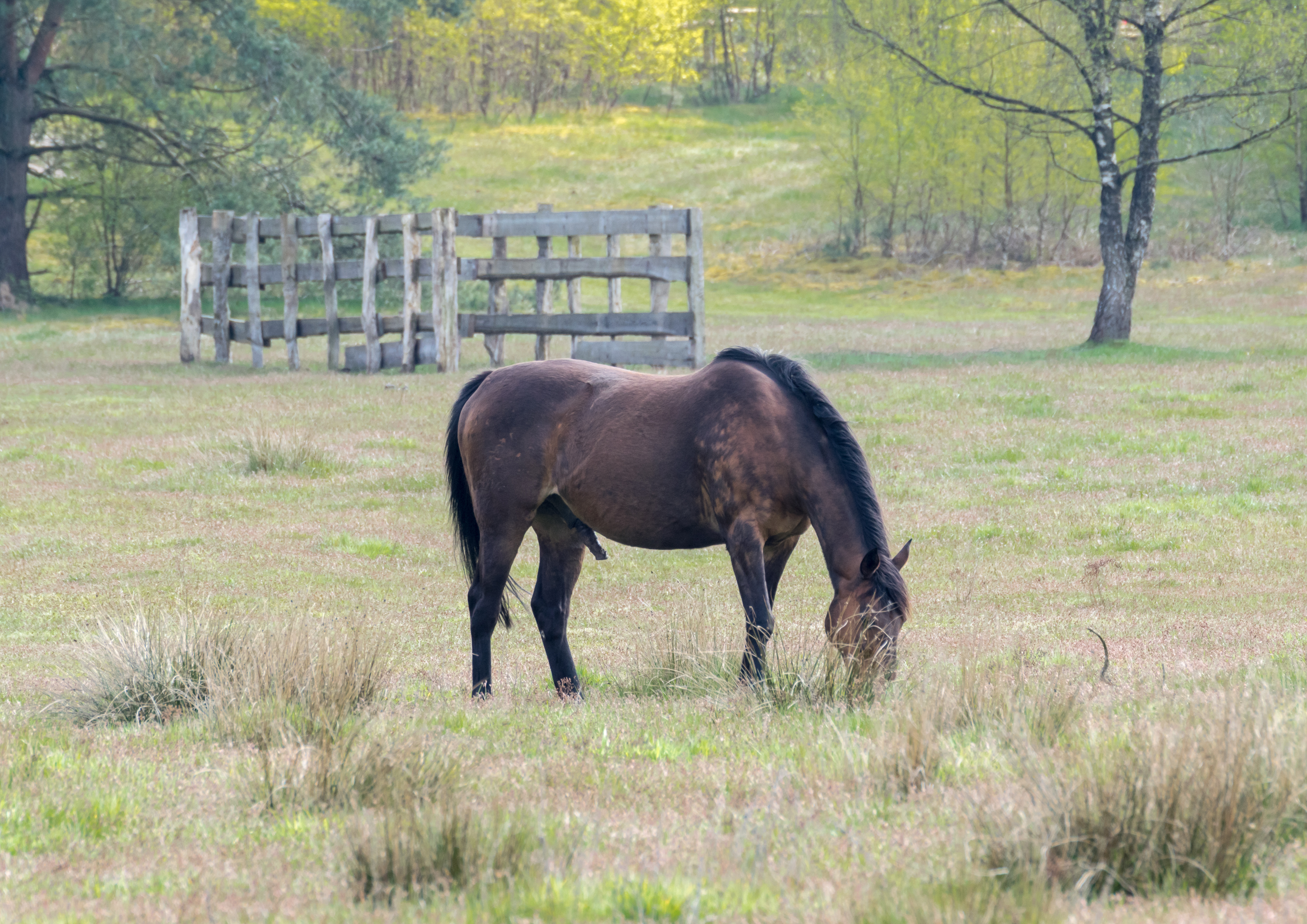 Extrem gefährdete Nutztierrasse "Senner Pferde" im Naturschutzgebiet Moosheide.